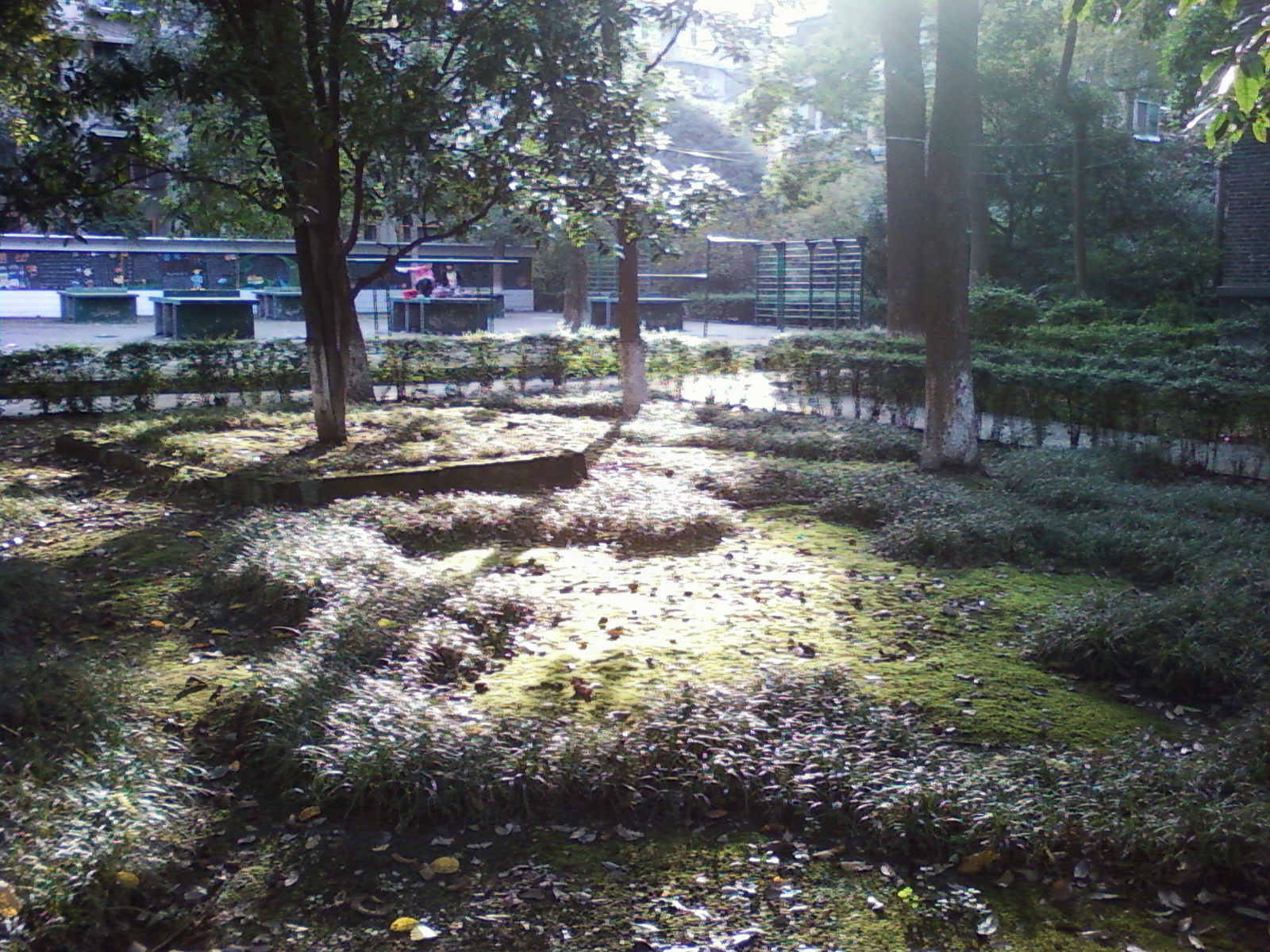 中文（新加坡）: 阳光下的花坛